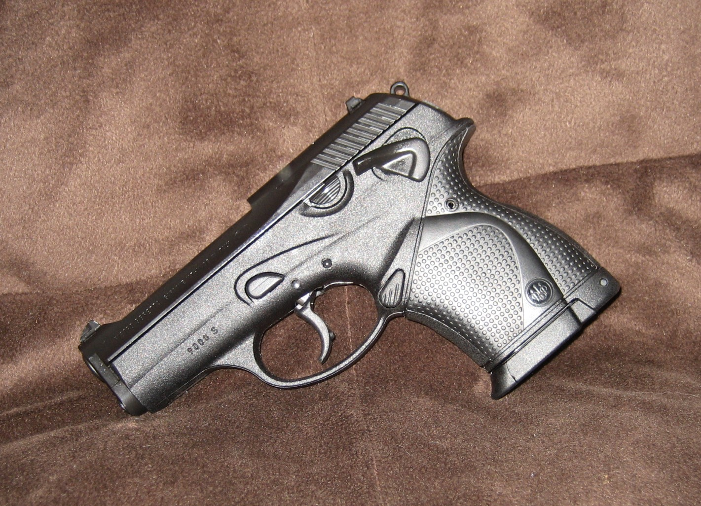 Beretta 9000S in 9 mm